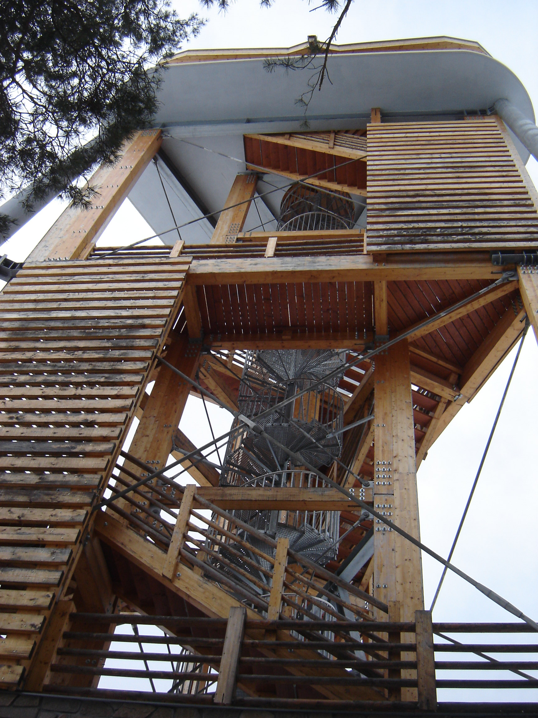 Rýdův kopec rozhledna